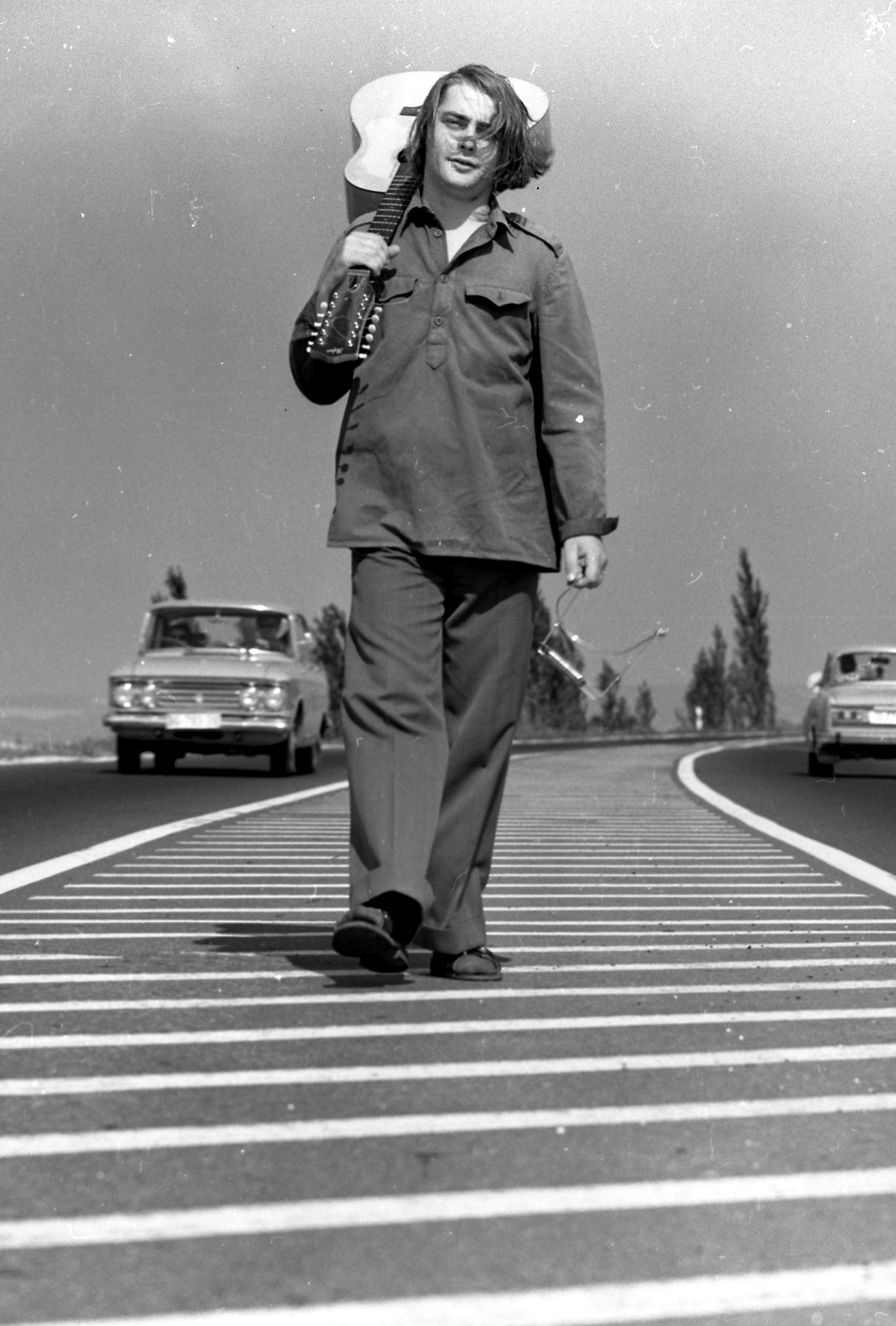 Dinnyés József (Szeged, 1948. augusztus 4. –) magyar zeneszerző, előadóművész, „daltulajdonos”, énekes, gitáros.